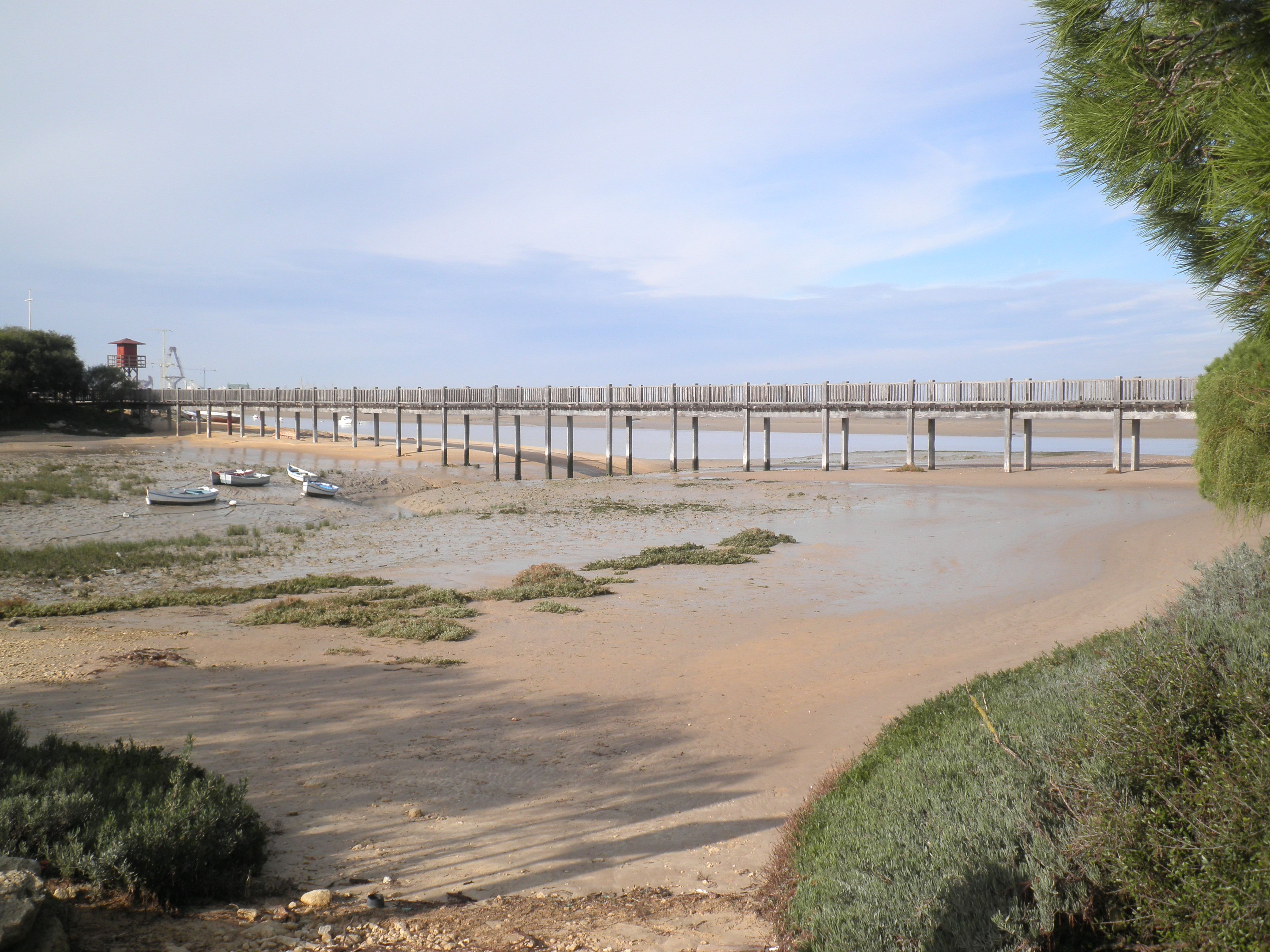 Puente peatonal sobre el caño de la Cortadura